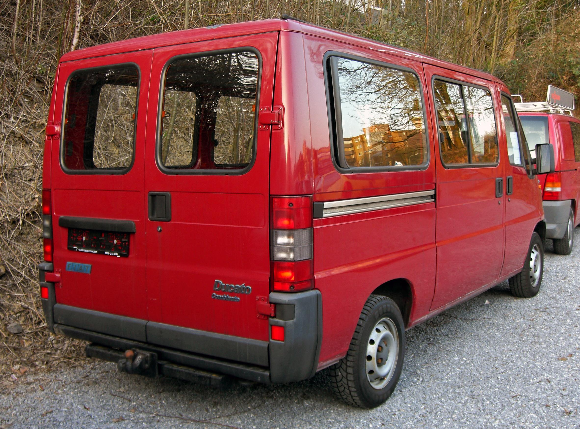 Fiat Ducato Combinato II.